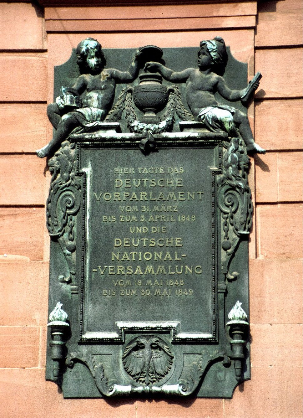 Gedenktafel Nationalversammlung - Frankfurt Paulskirche